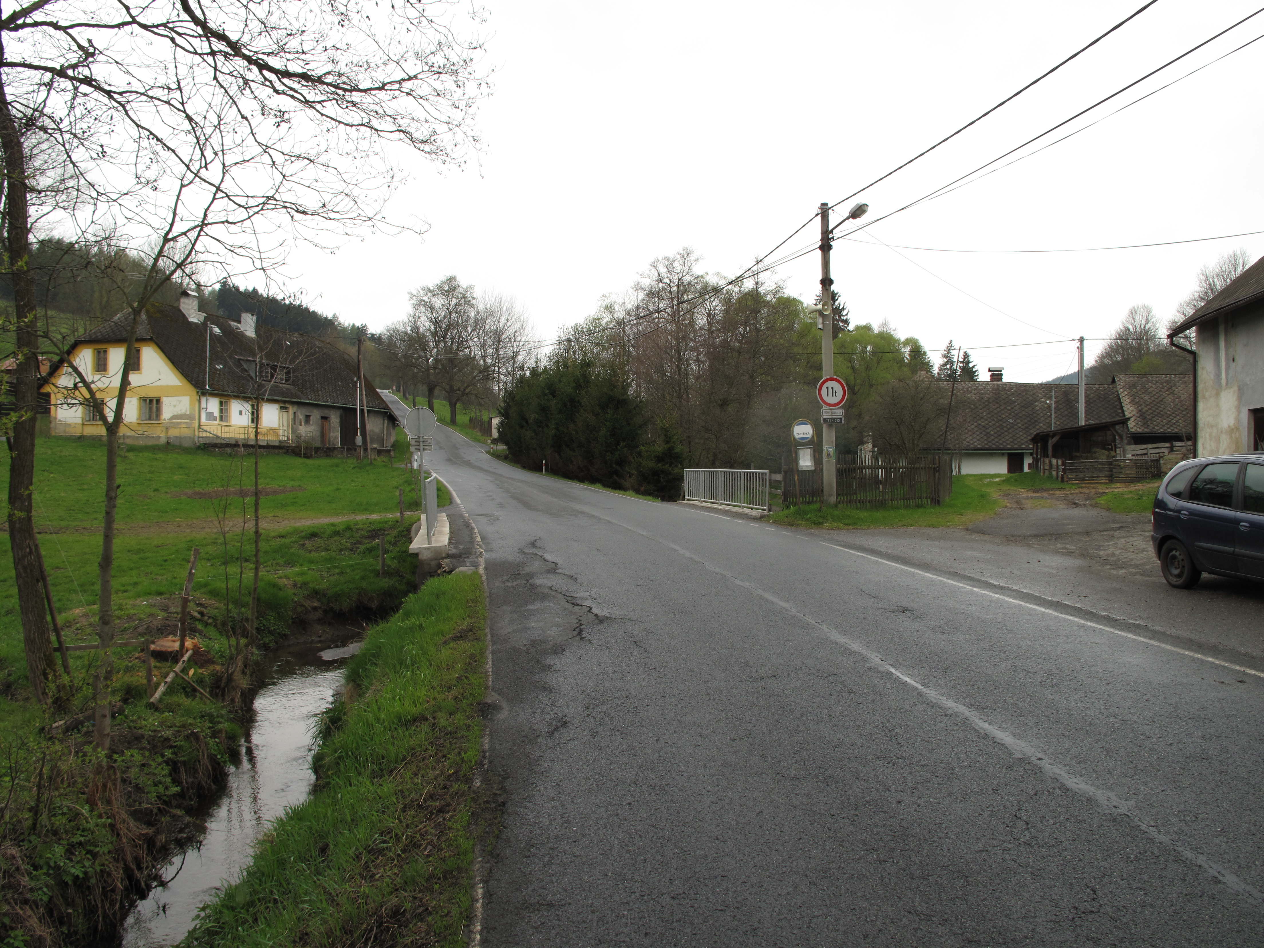 Pích. Okres Klatovy, Česká republika.